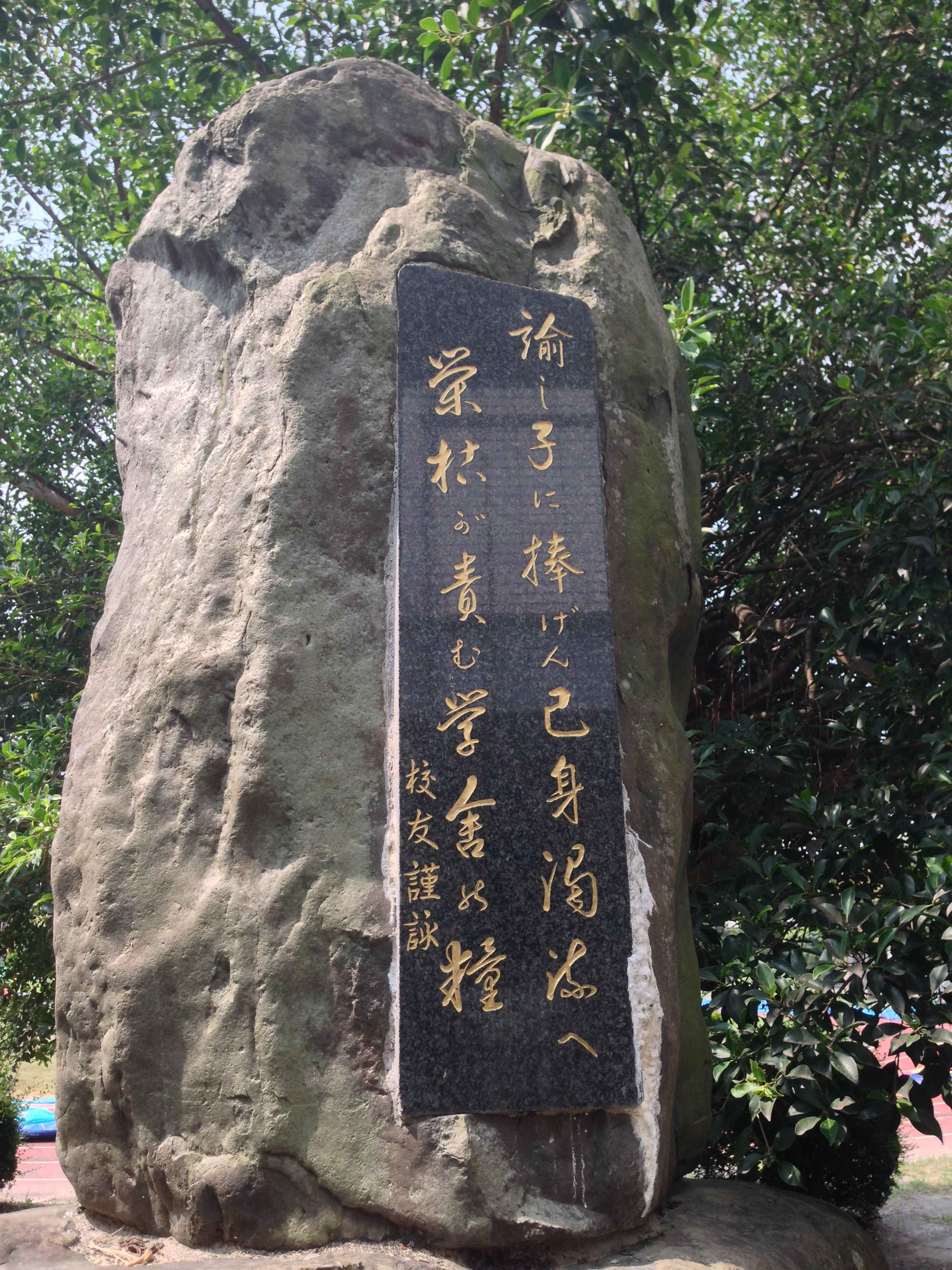 中文（台灣）: 淺井初子先生紀念碑背面近照